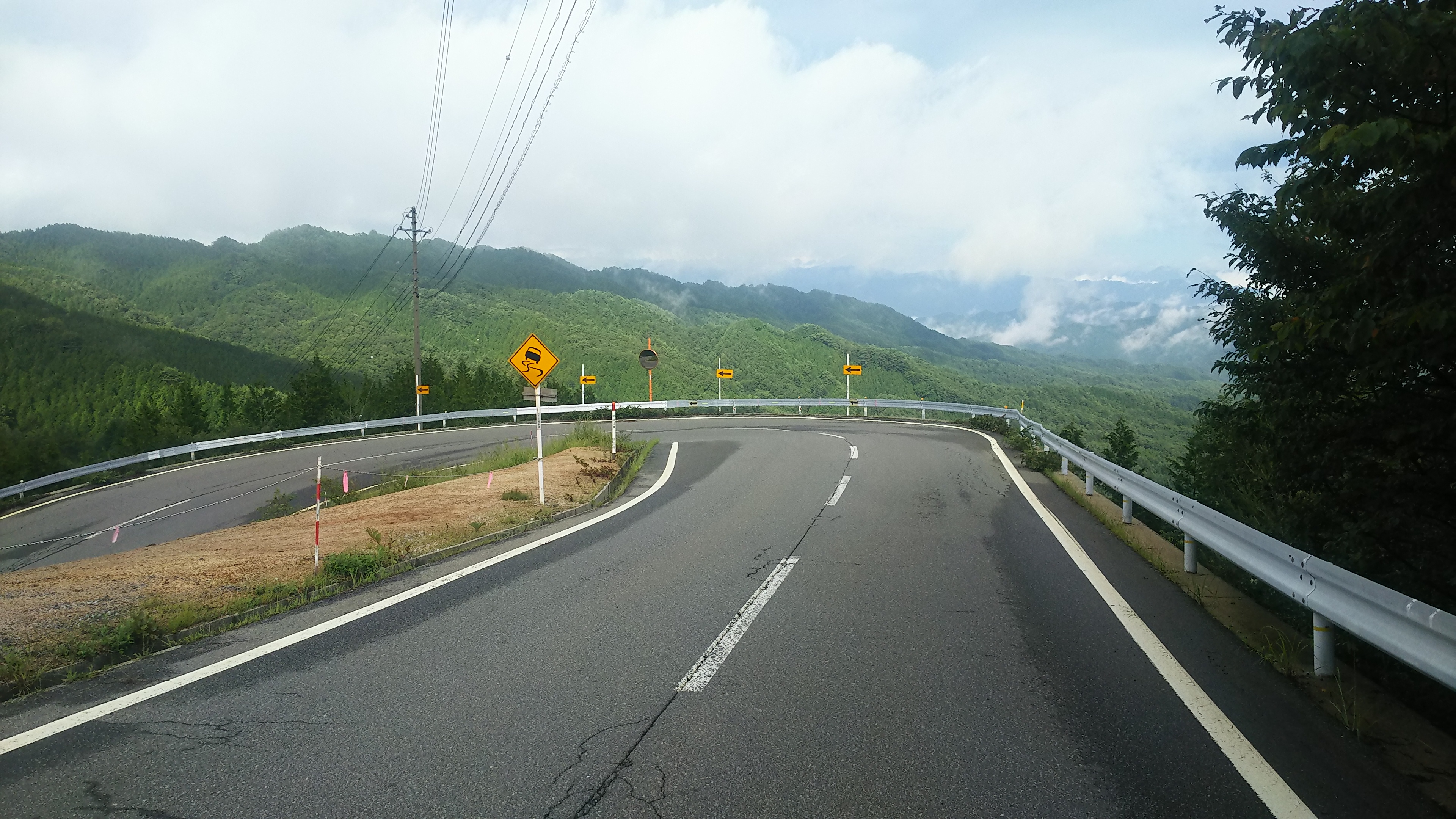 平谷峠の画像です